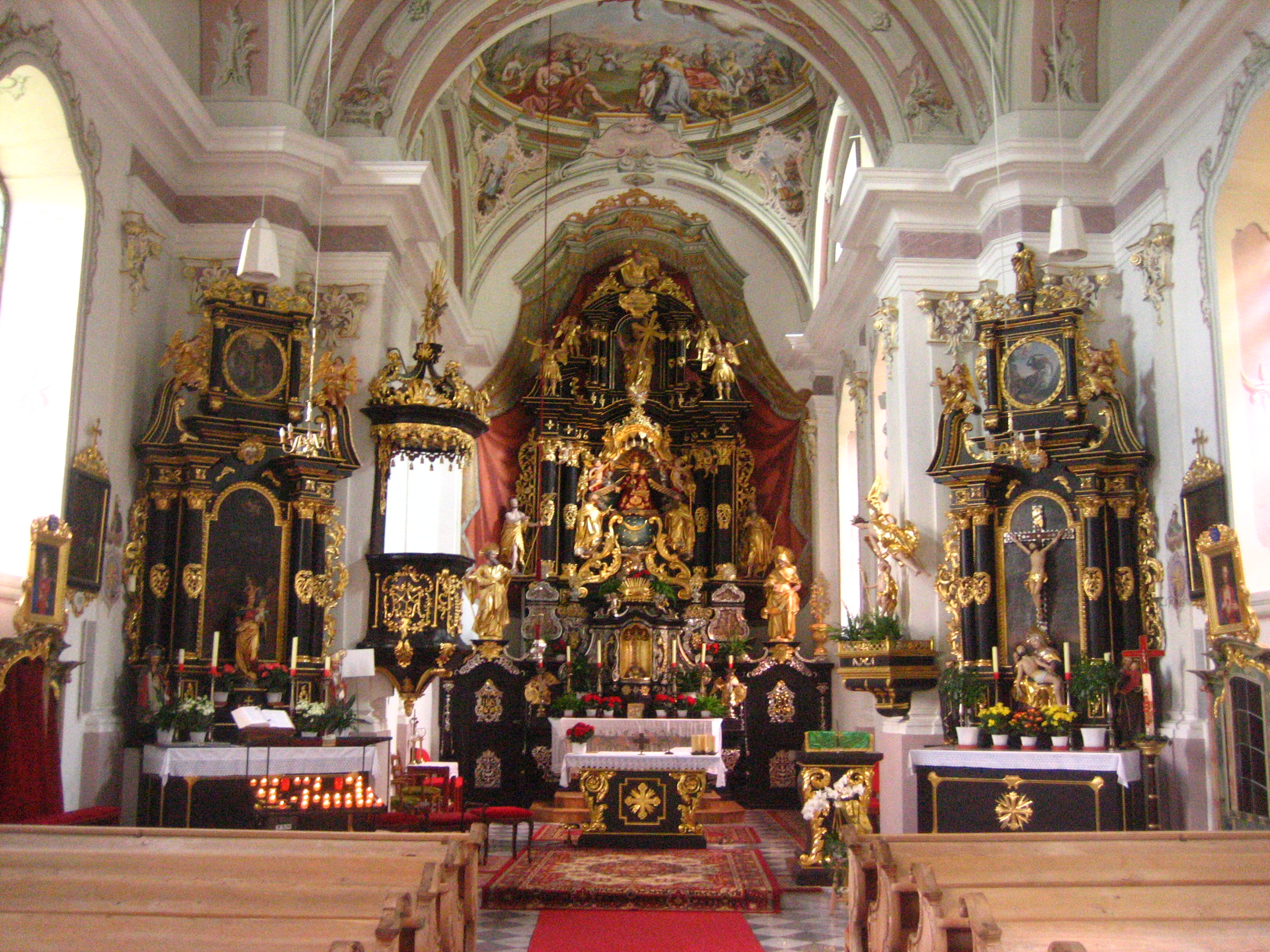 Lavant - Pfarrkirche Heiliger Ulrich, Blick in den Altarraum